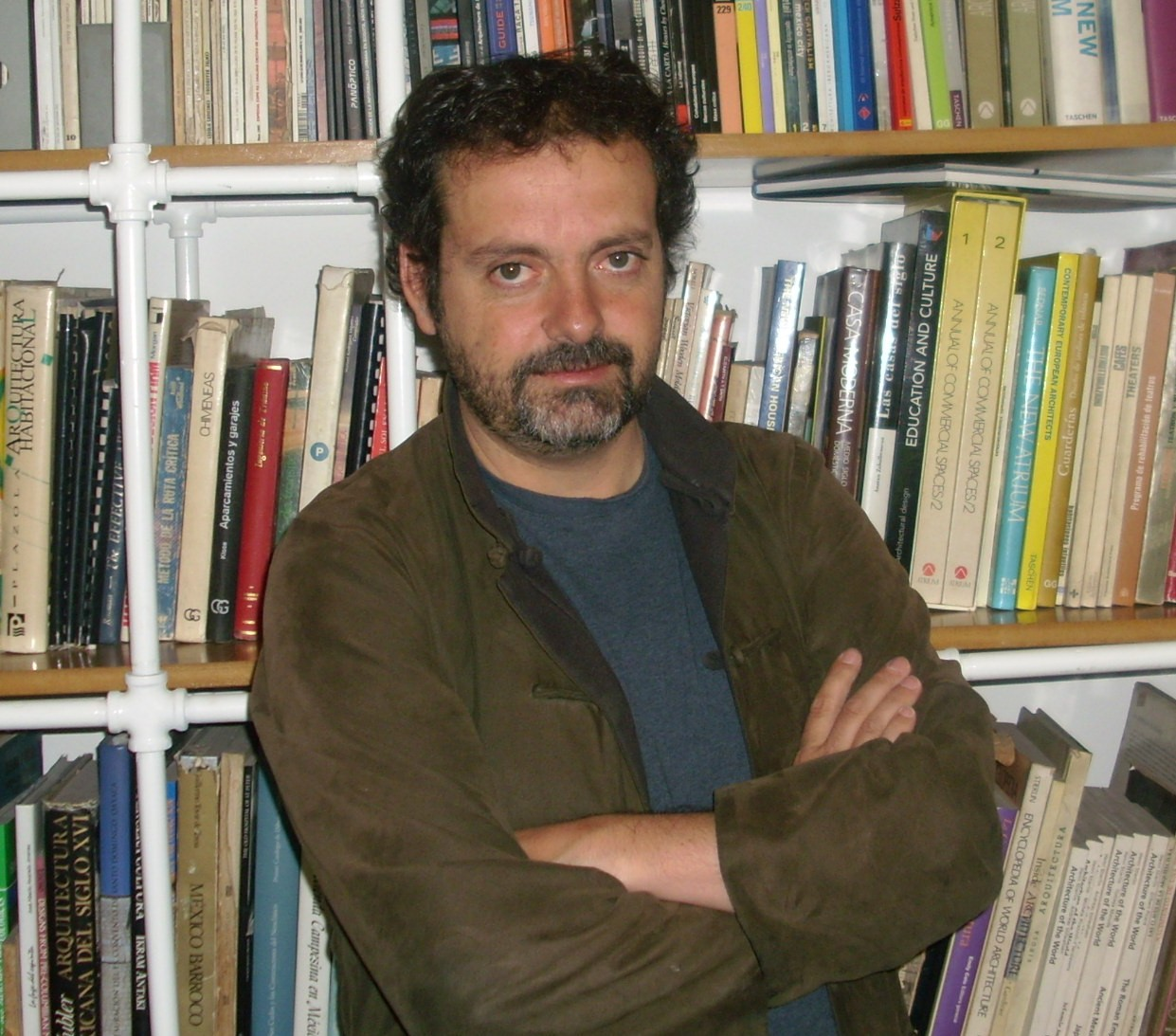 Foto Del Arquitecto Mauricio Rocha